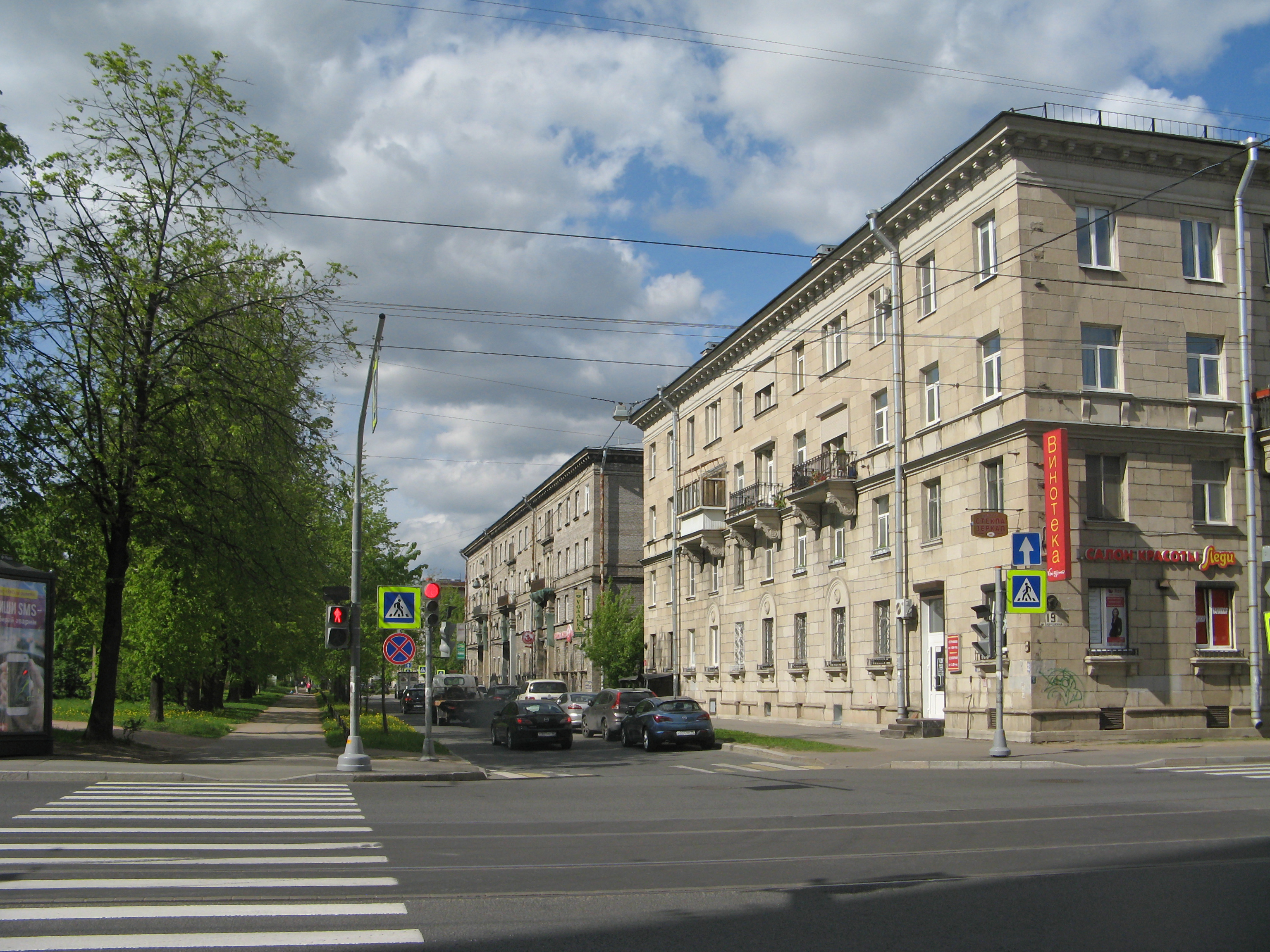 Санкт-Петербург, ул. Академика Шиманского